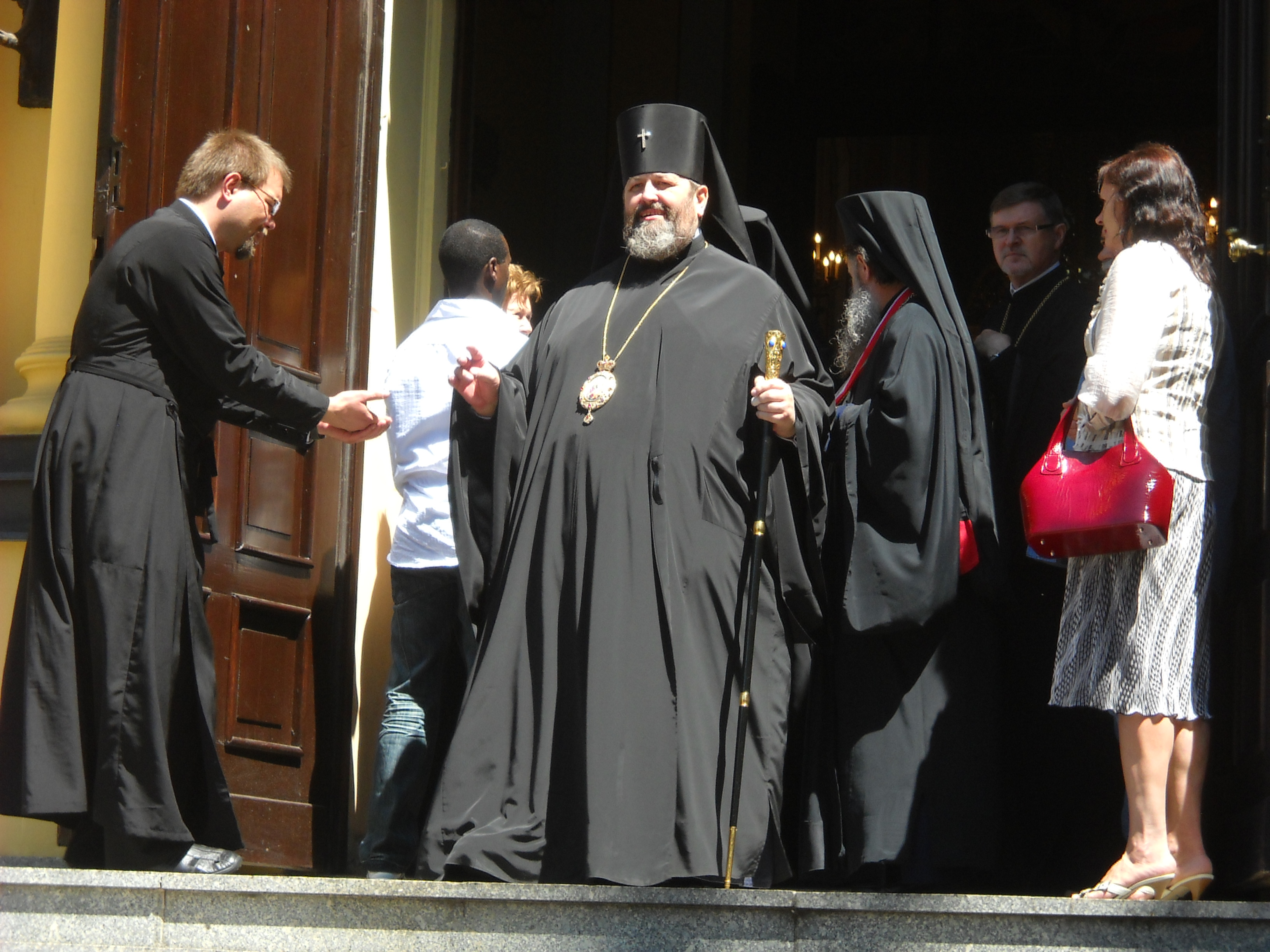 Arcybiskup lubelski i chełmski Abel (Popławski)